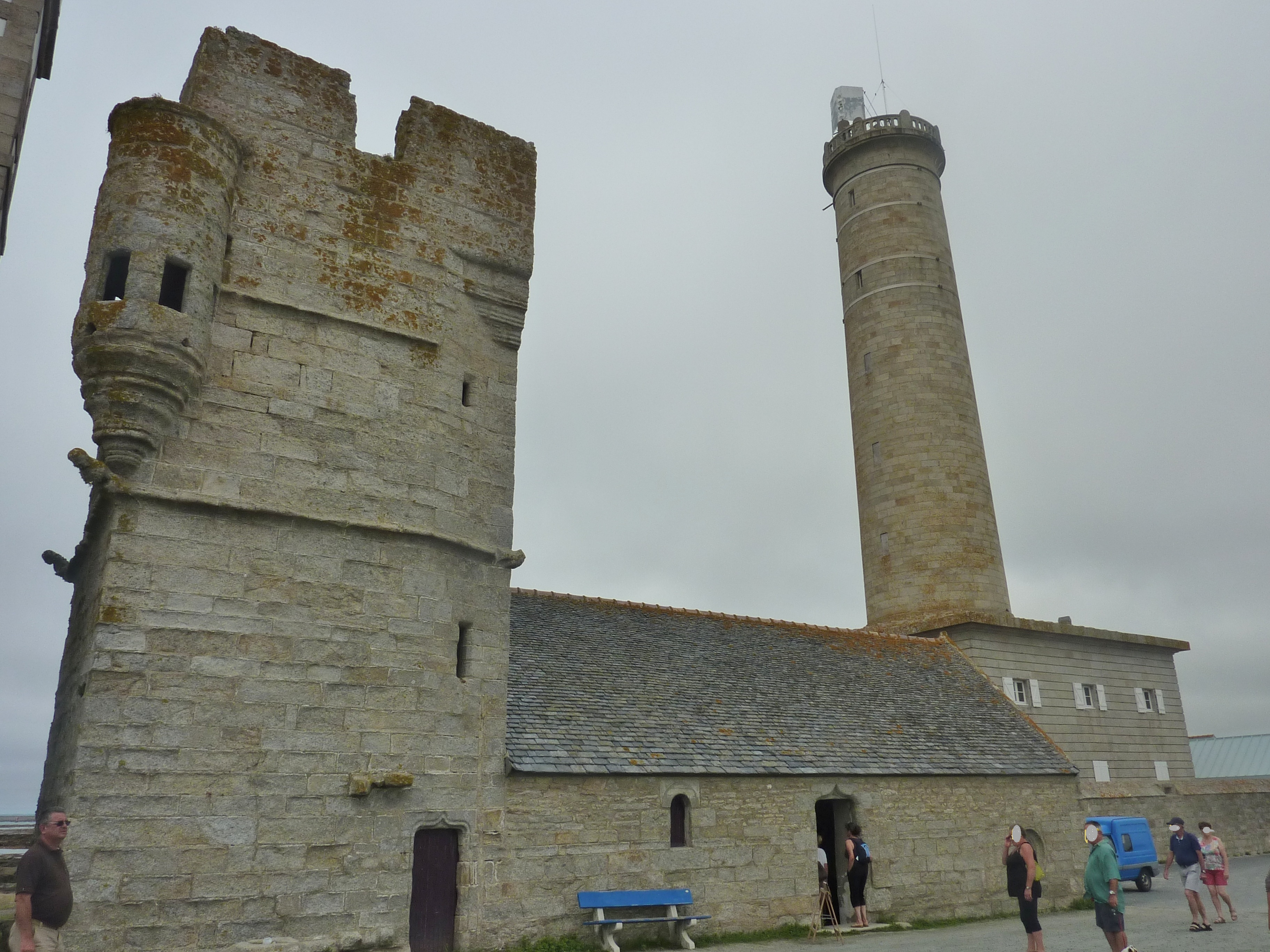 Penmarch : l'ancienne chapelle Saint-Pierre, à proximité du port de Saint-Pierre et du phare d'Eckmühl. Datant du XVIe siècle, elle fut réduite de moitié lors de la construction de l'ancien phare en 1835. La tour adossée à la chapelle servait à la fois de clocher, de lieu de défense et de refuge ainsi que de sémaphore et de phare avant la création du 1er phare en 1835.